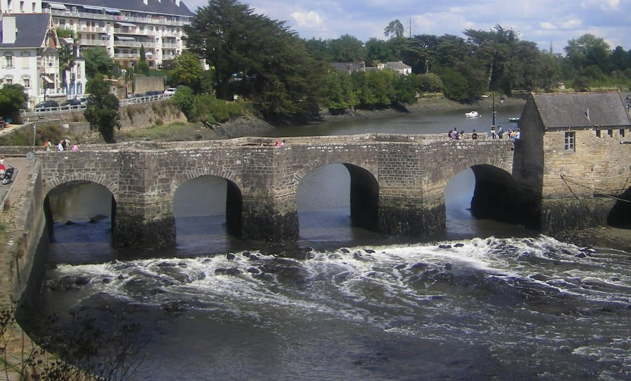 Pont de pierre d'Auray, sur l’aber Loc'h